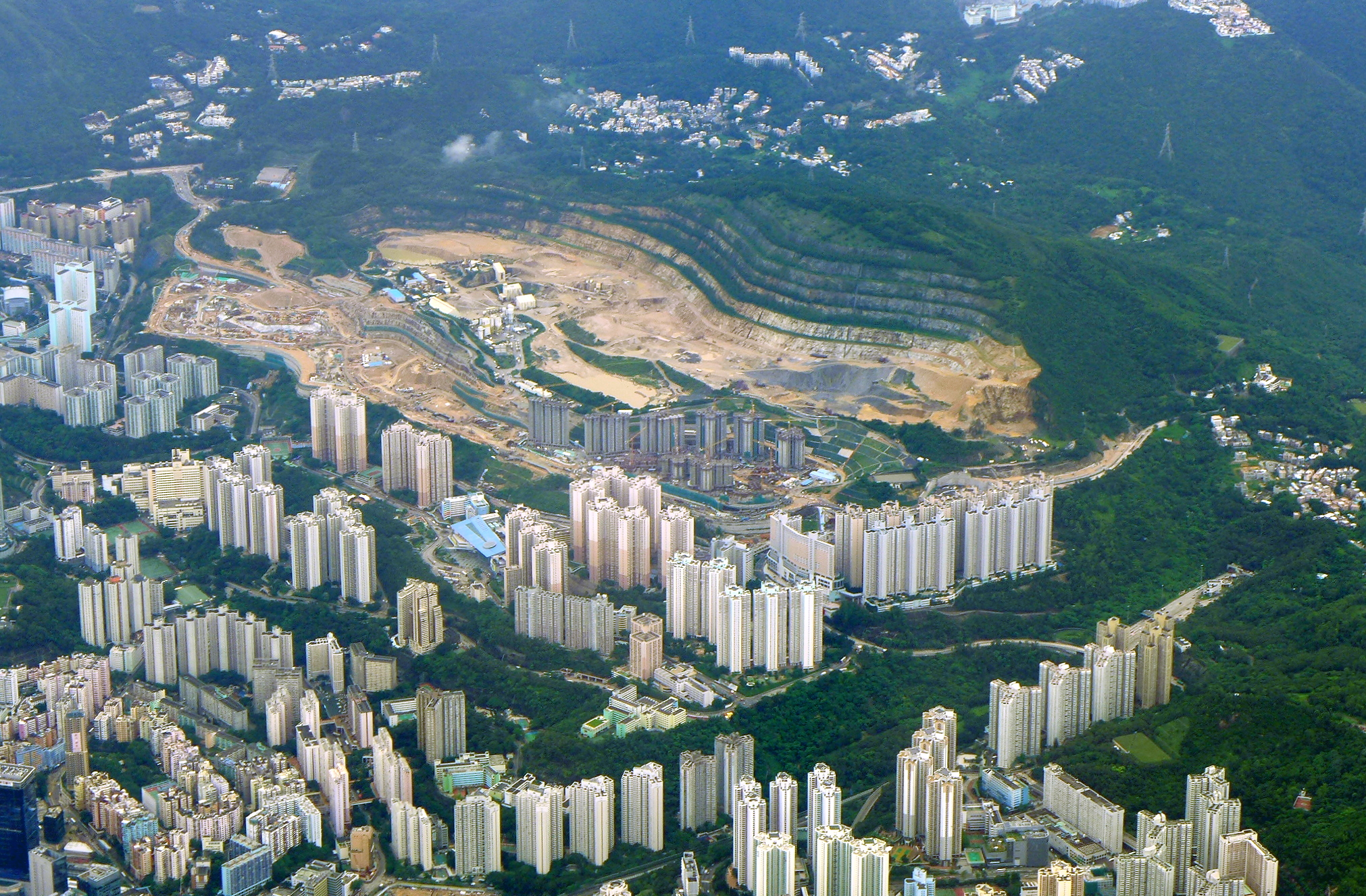 Anderson Road Development Site